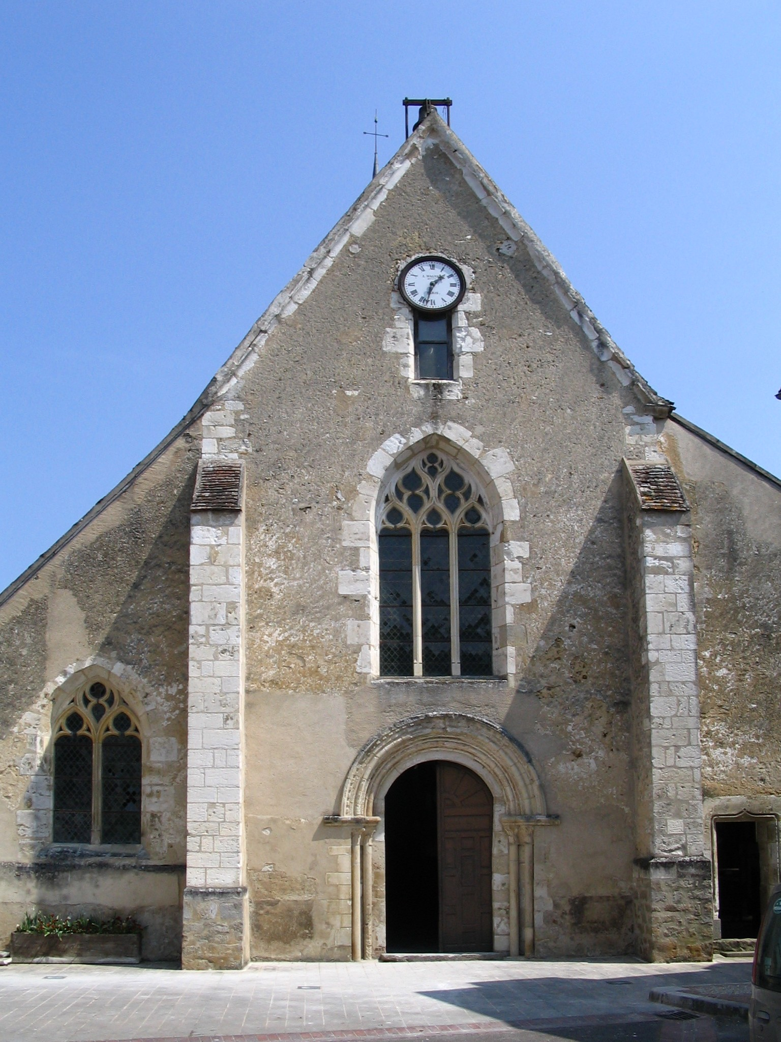 Eglise de La Ferté-Loupière - Yonne - France